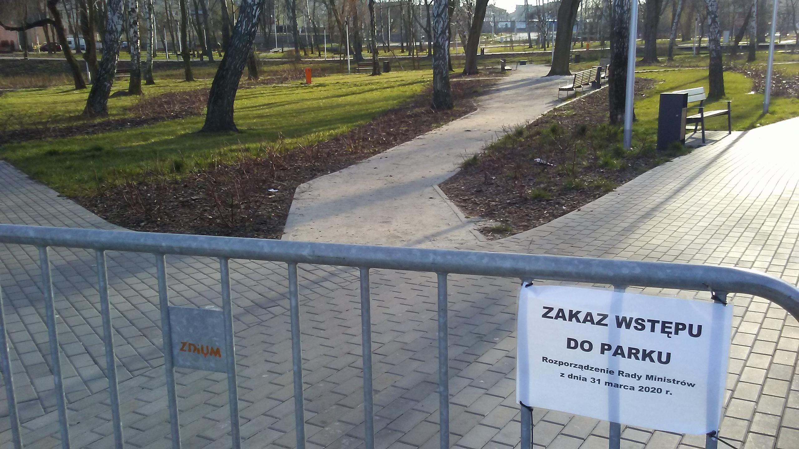 COVID-19. Tomaszów Mazowiecki. Zamknięcie Parku Miejskiego „Nowe Bulwary”